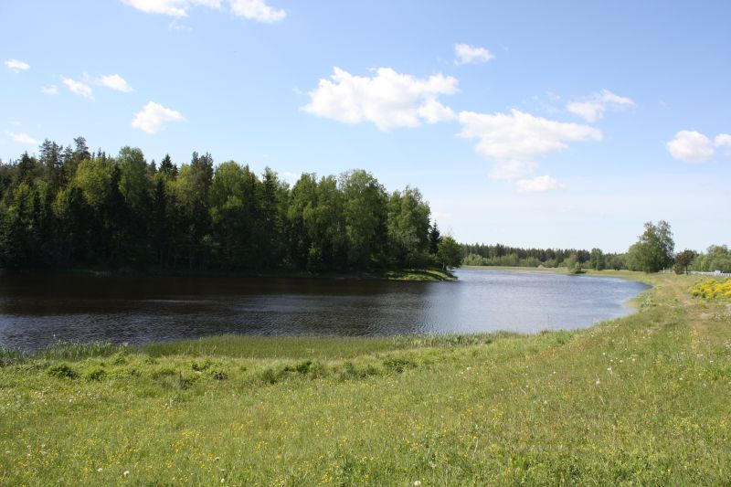 Raudoja veehoidla